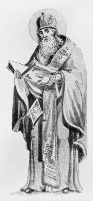 Свт. Геннадий, архиеп. Новгородский. Литография. 1895 г.